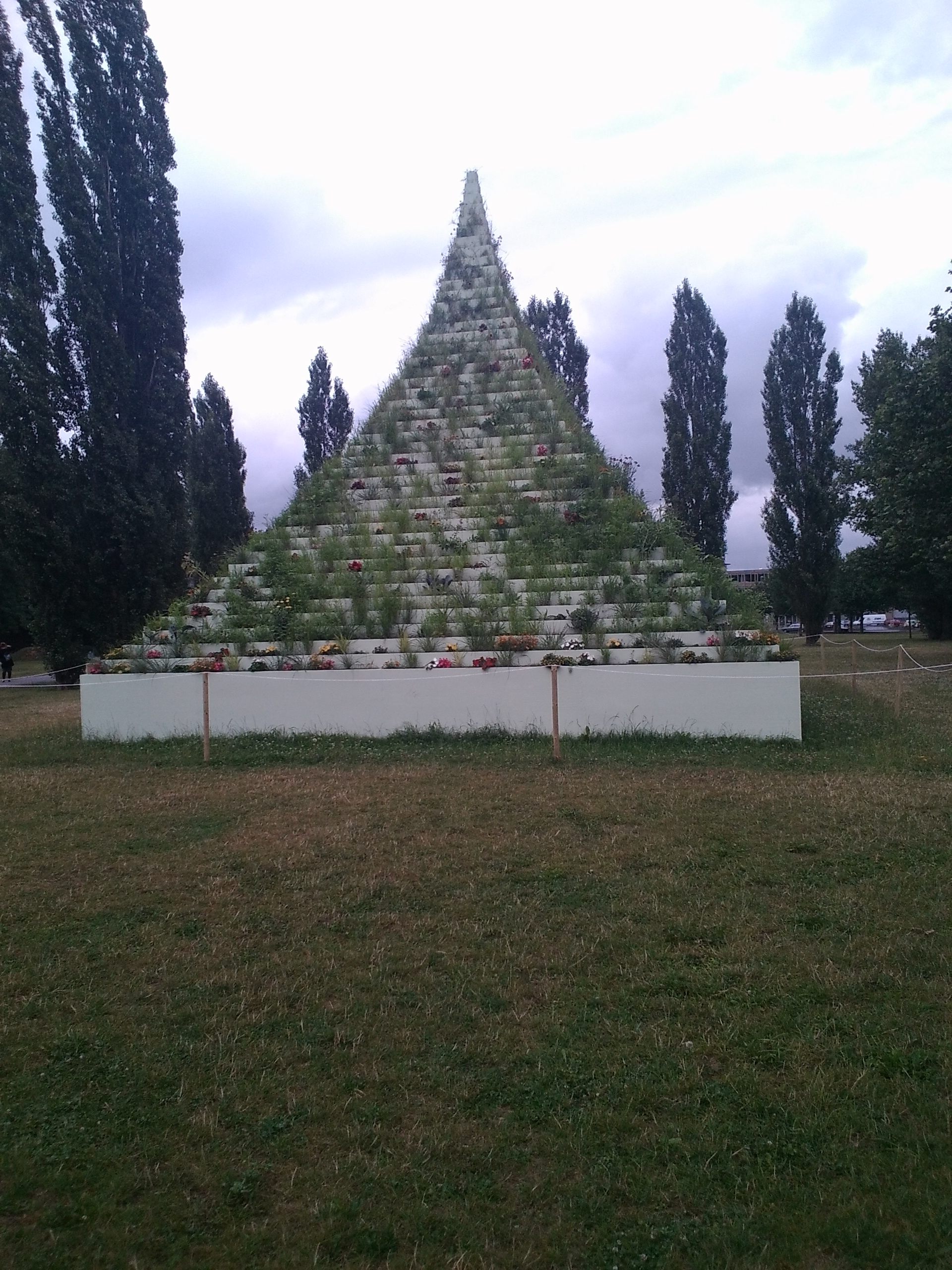 The Living Pyramid, Skulptur von Agnes Denes, documenta 14, Kassel, Nordstadtpark